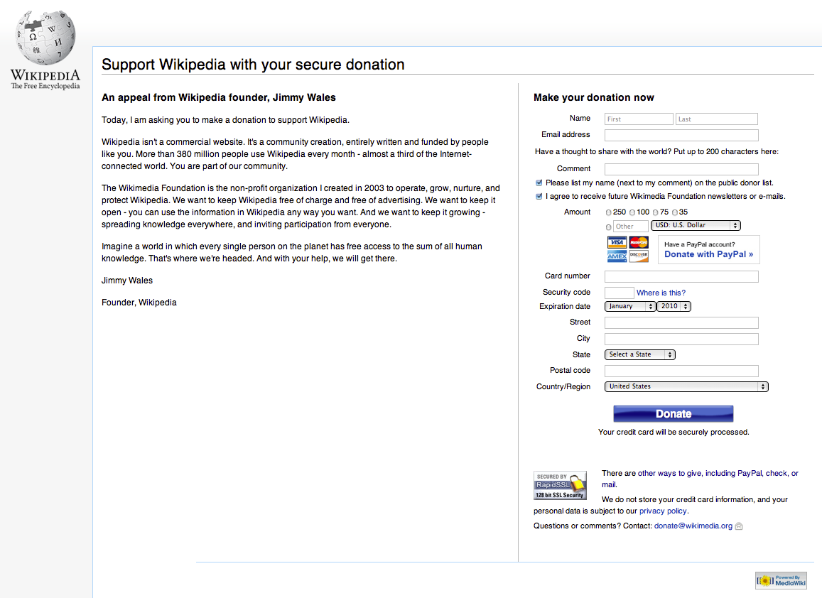 2010 Fundraiser Landing Page D